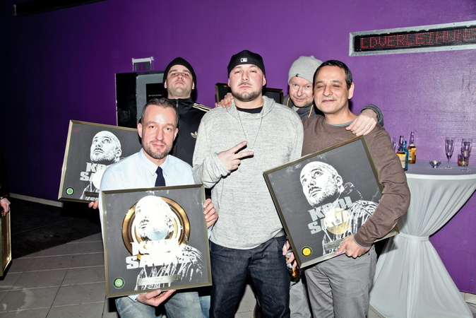 Goldverleihung des Albums „Aura“ (Von links: David Laube (Geschäftsführer Essah Entertainment), Holger Schneider (Groove Attack/GoodToGo), Kool Savas, Lars Krings (Groove Attack/GoodToGo) und Ramin Bozorgzadeh (Groove Attack/GoodToGo))